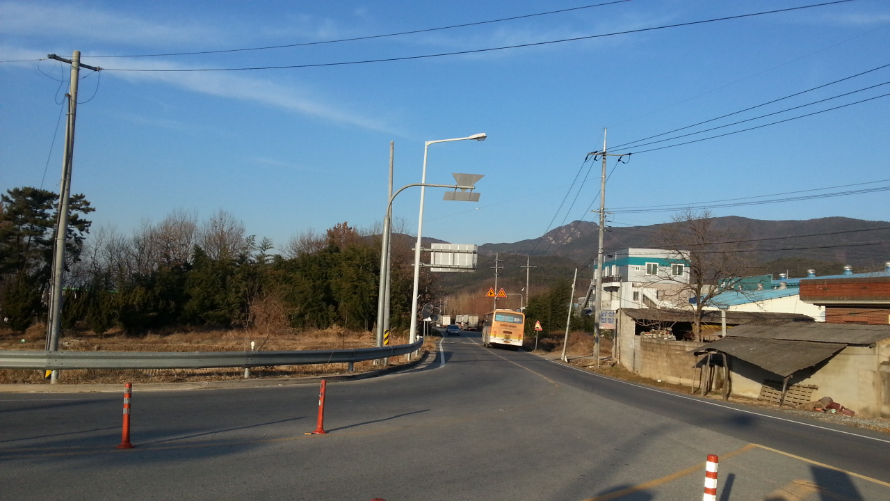 반구대로, 포석로 시점 구간